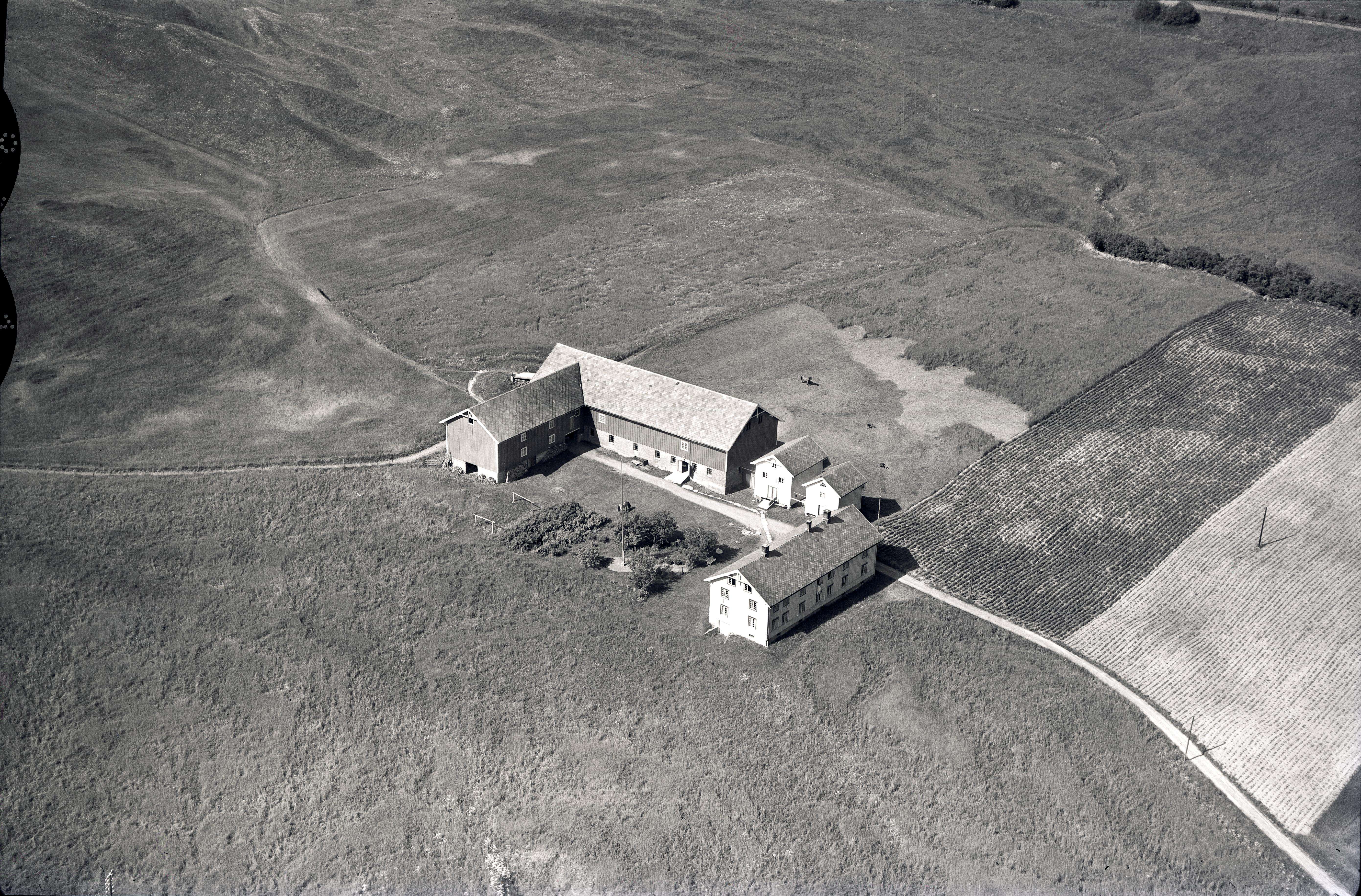 Gårdsbruk i Leinstrand: Romulslia gård. Gården tilhørte kapellanen ved Domkirken på 1600-tallet, solgt til bondeselveie i 1834. Den ble utstykket til bebyggelse fra 1960-årene og har gitt navn til boligområdet Romulslia